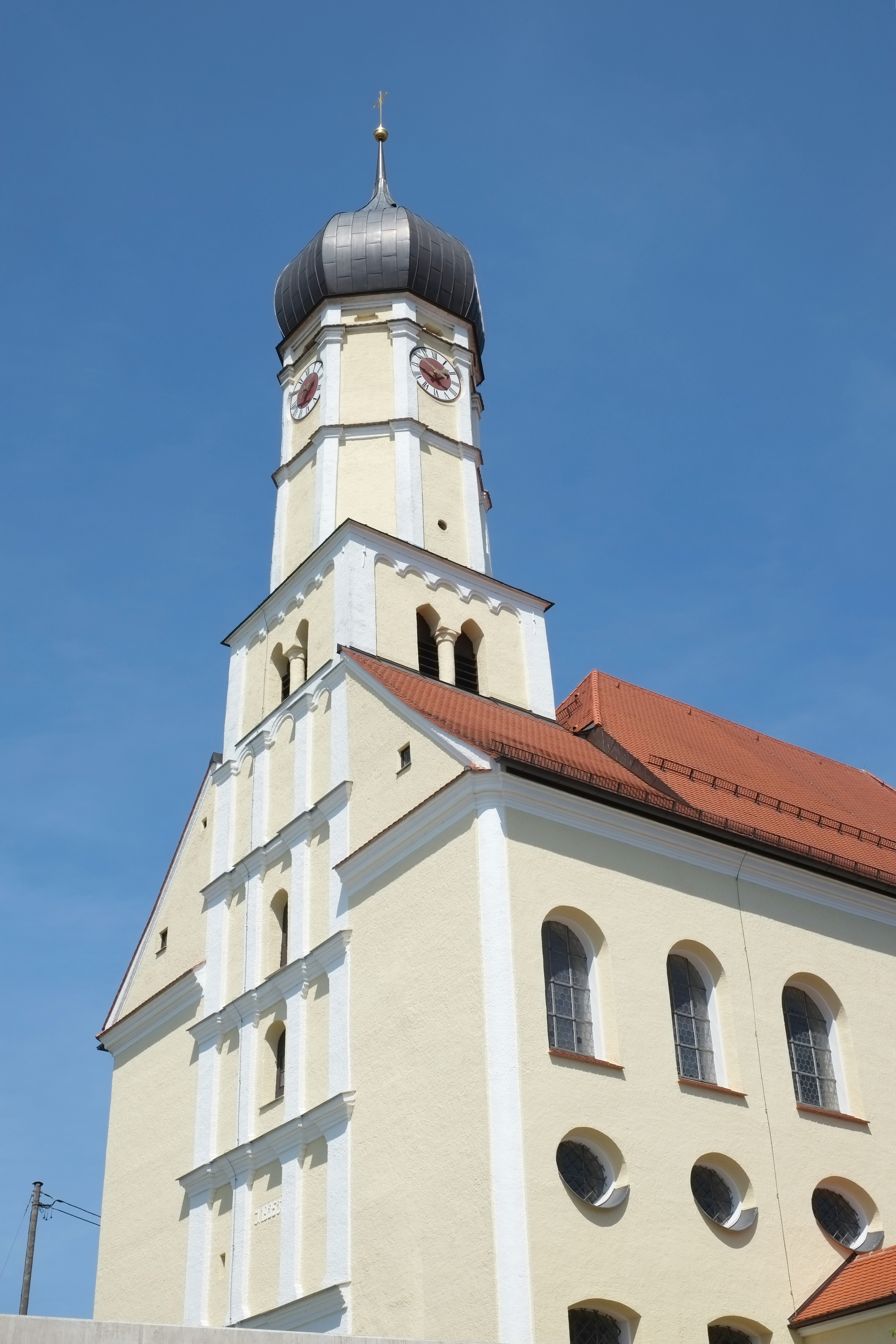 Katholische Pfarrkirche Mariä Verkündigung in Welden im Landkreis Augsburg (Bayern, Deutschland)